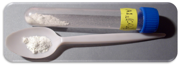 Uhličitan hlinitý - Al2(CO3)3